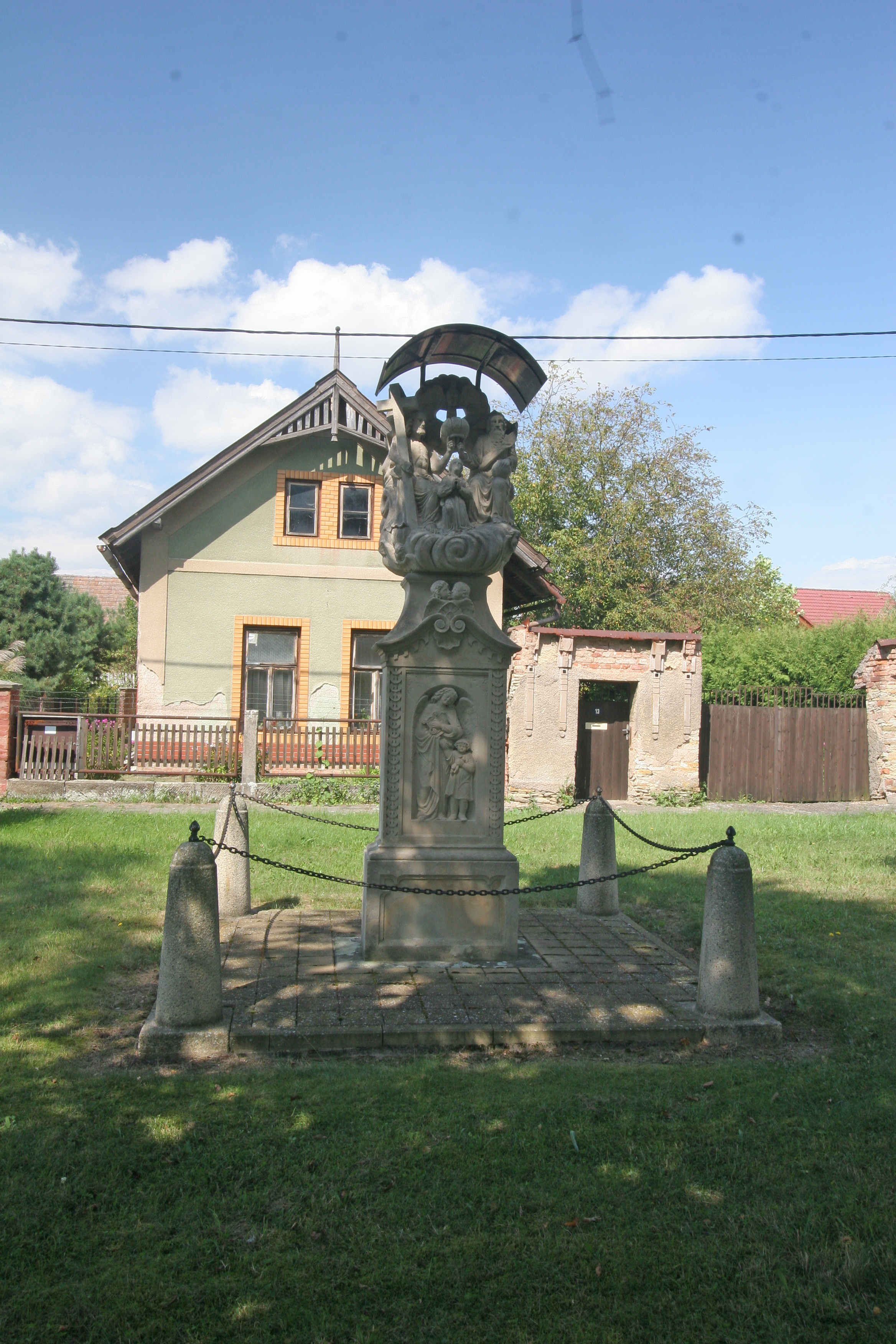 Rasošky socha svaté Trojice